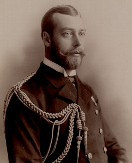 George V